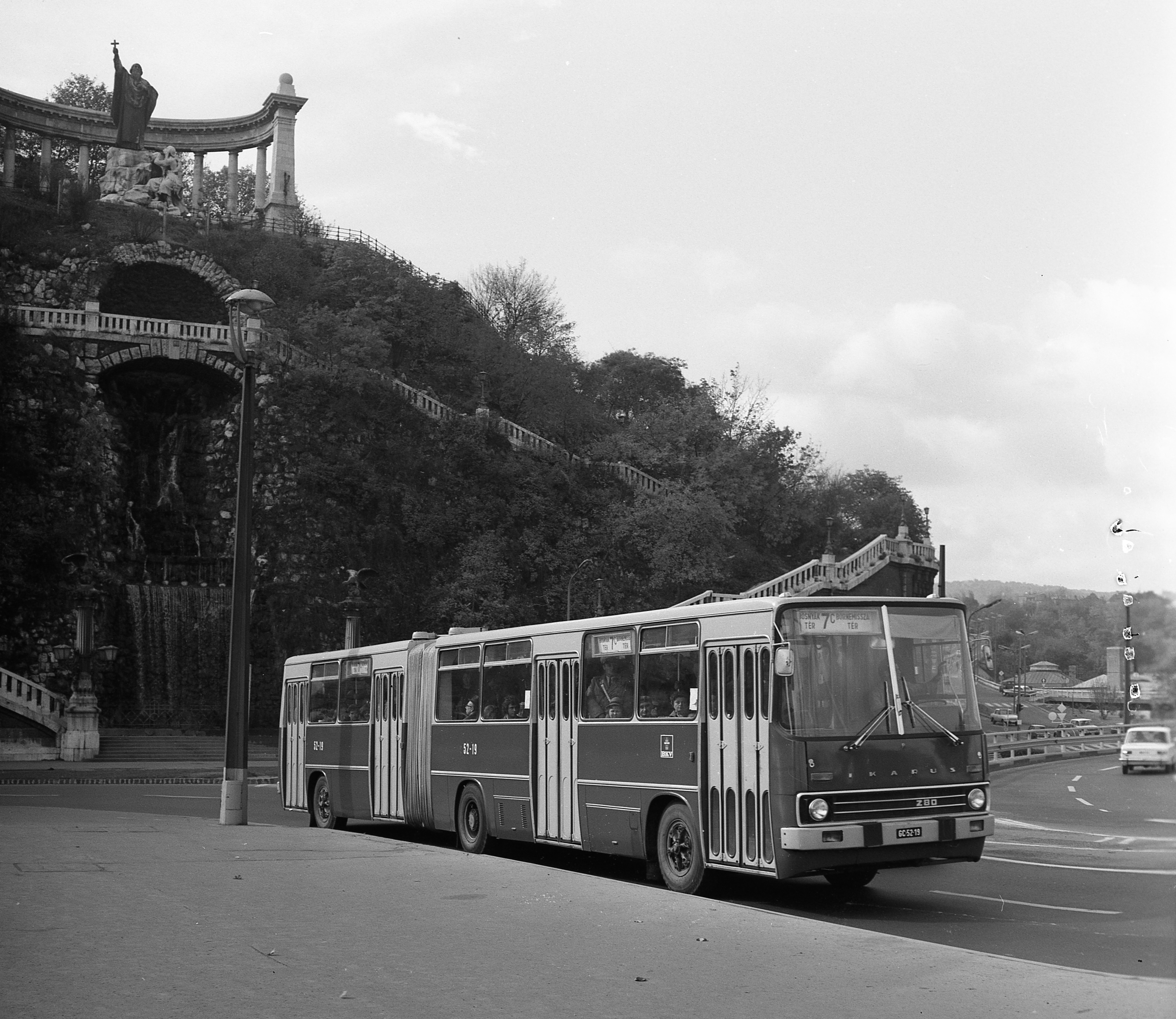 Erzsébet híd budai hídfő. Balra Szent Gellért szobra alatt a vízesés. Location: Hungary, Budapest I. Tags: Ikarus-brand, Hungarian brand, bus, sculpture, Budapest Title: Erzsébet híd budai hídfő. Balra Szent Gellért szobra alatt a vízesés.